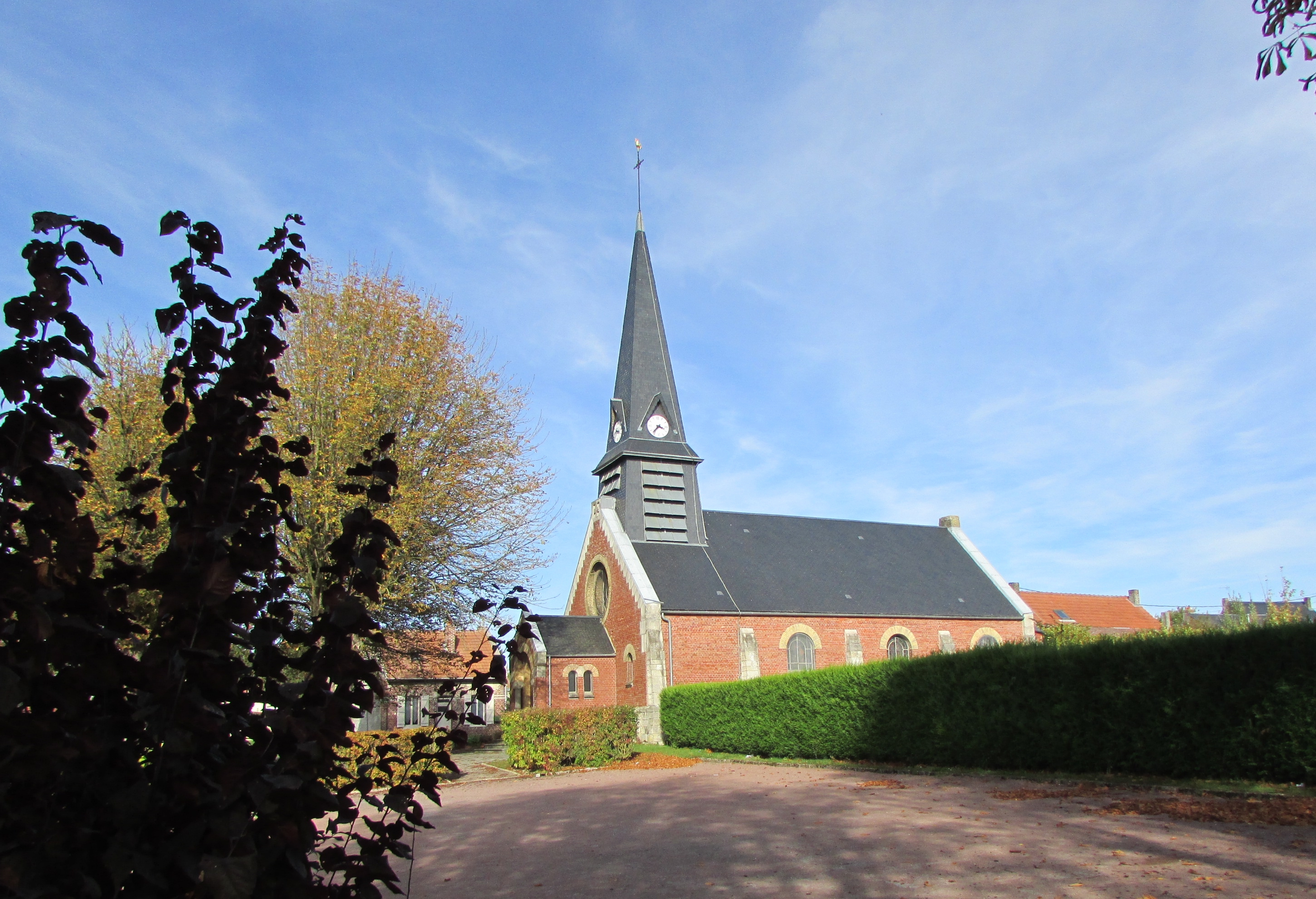 L'2glise.